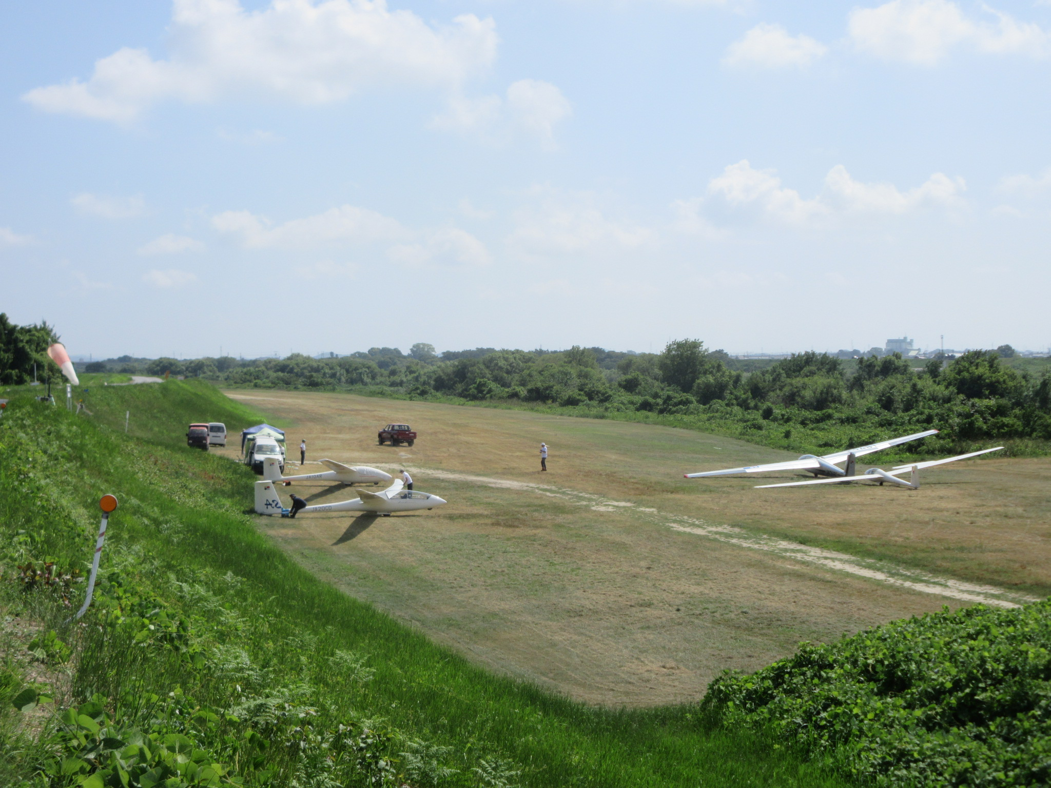 岡崎滑空場（岡崎市八帖南町）